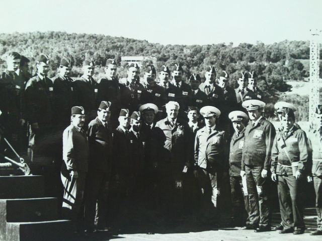 Ельцин на Камчатке с экипажем К-433